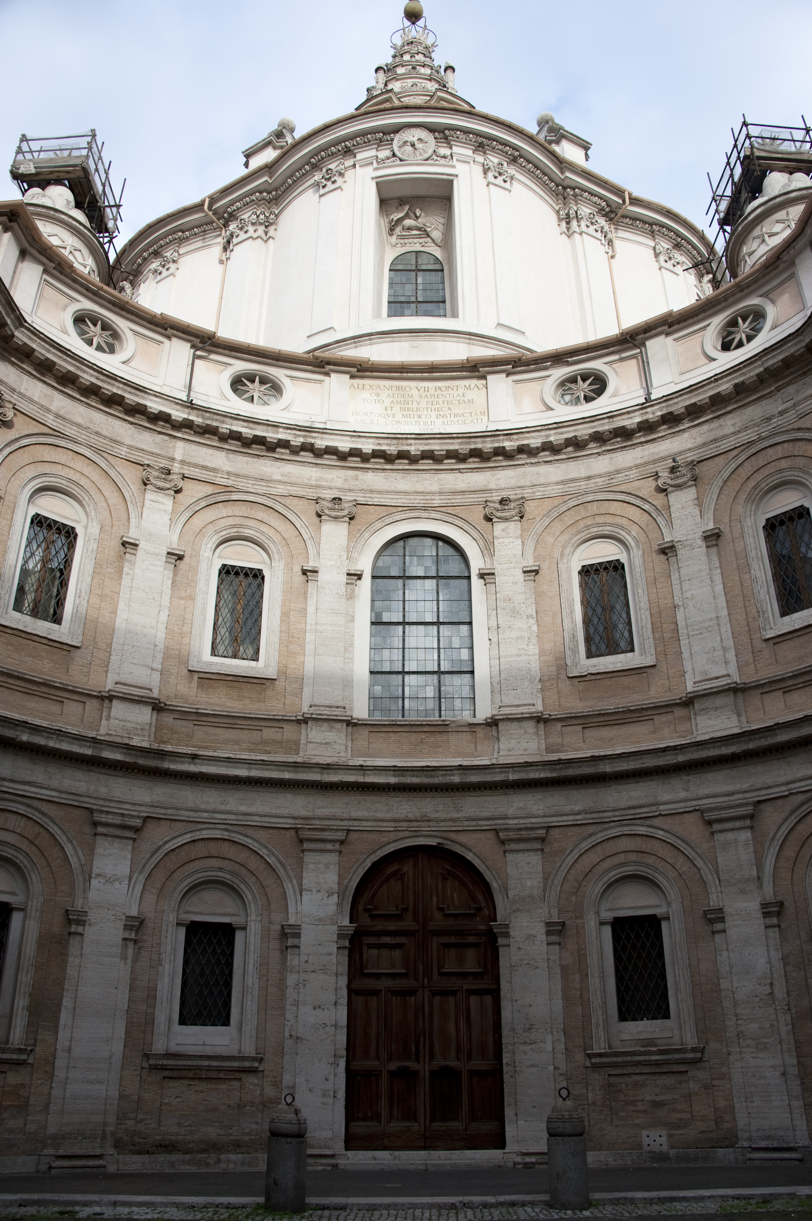 Archivio Centrale dello Stato -MIBAC This is a photo of a monument which is part of cultural heritage of Italy.